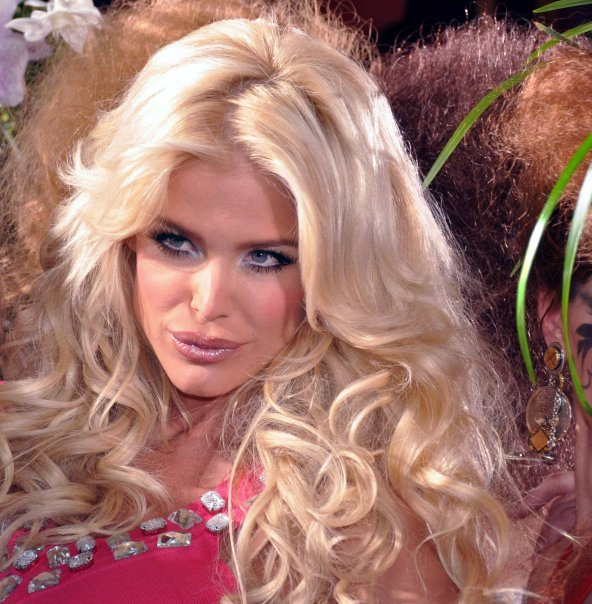 Victoria Silvstedt au défilé Christophe Guillarme.